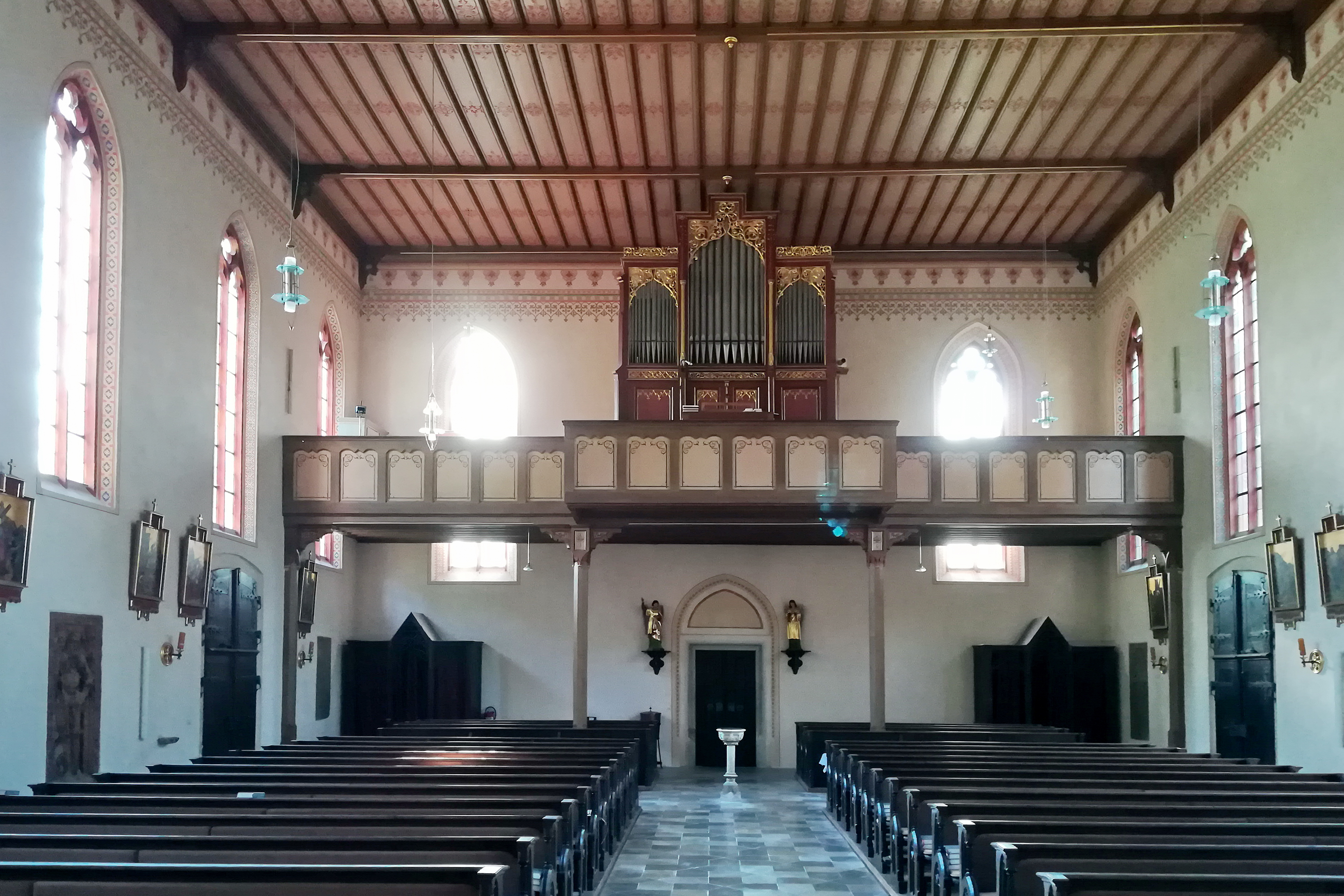 Die römisch-katholische Pfarrkirche St. Nikolaus in Bad Abbach ist ein neugotischer Kirchenbau, der in den Jahren 1849 bis 1852 anstelle eines barocken Vorgängerbaus errichtet wurde.